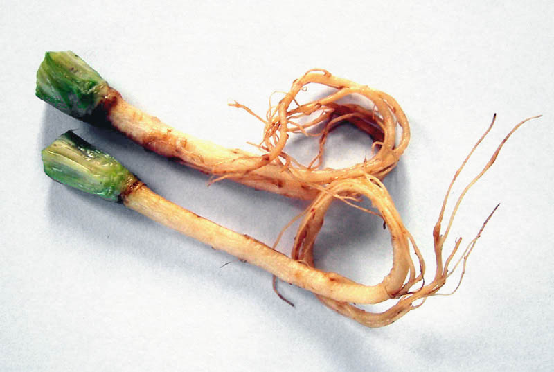 Coriander roots